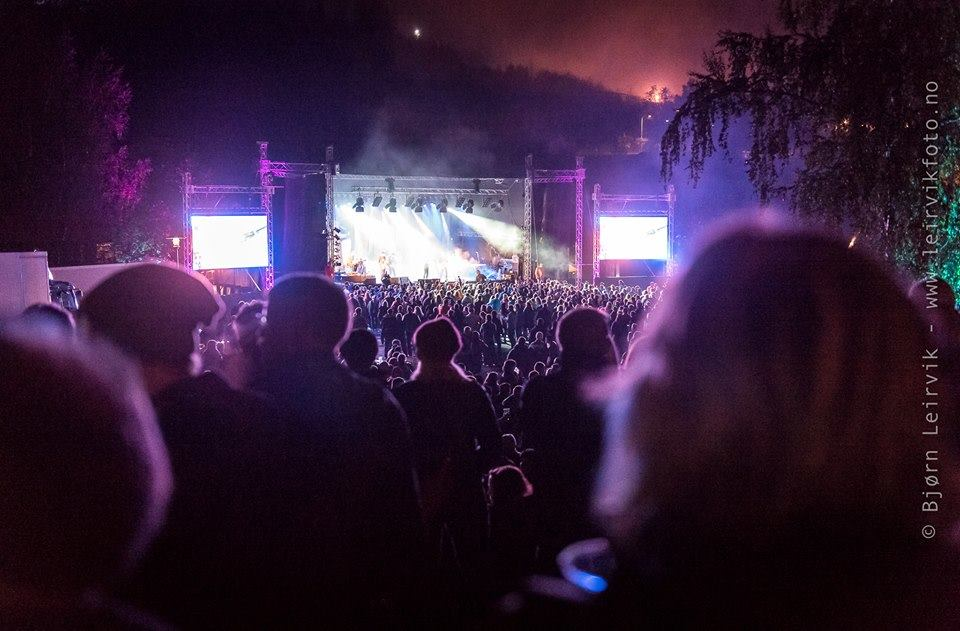 Bildet av hovedscenen på Verket Musikkfestival